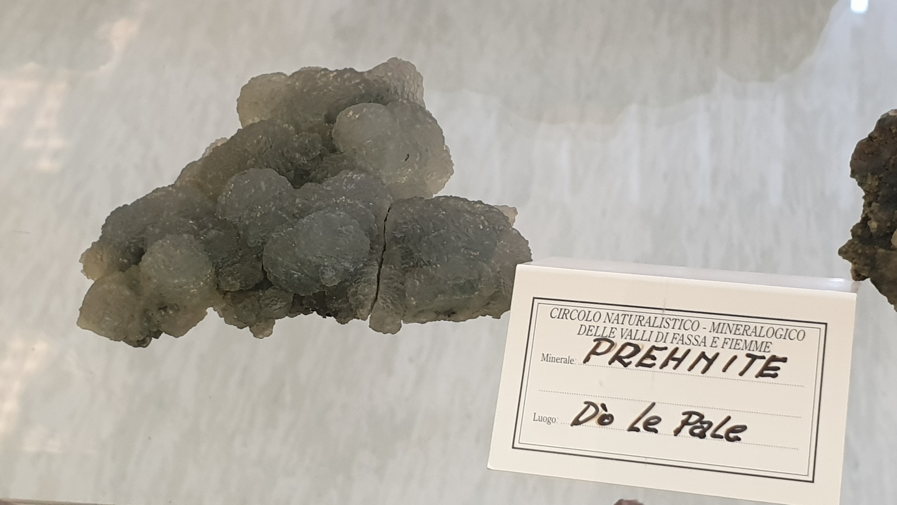 Esemplare di Prehnite trovato in località Dò le Pale